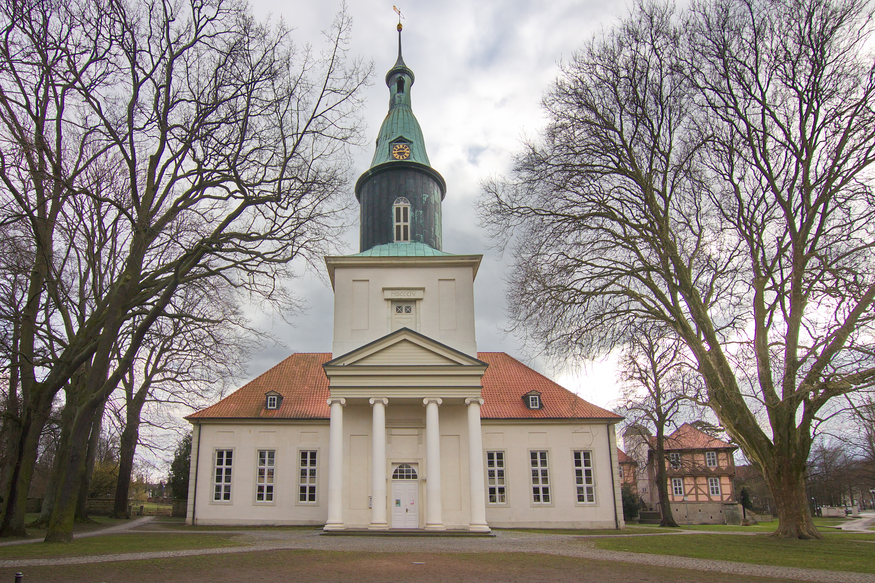 St. Michaeliskirche in Fallersleben (Wolfsburg), Niedersachsen, Deutschland